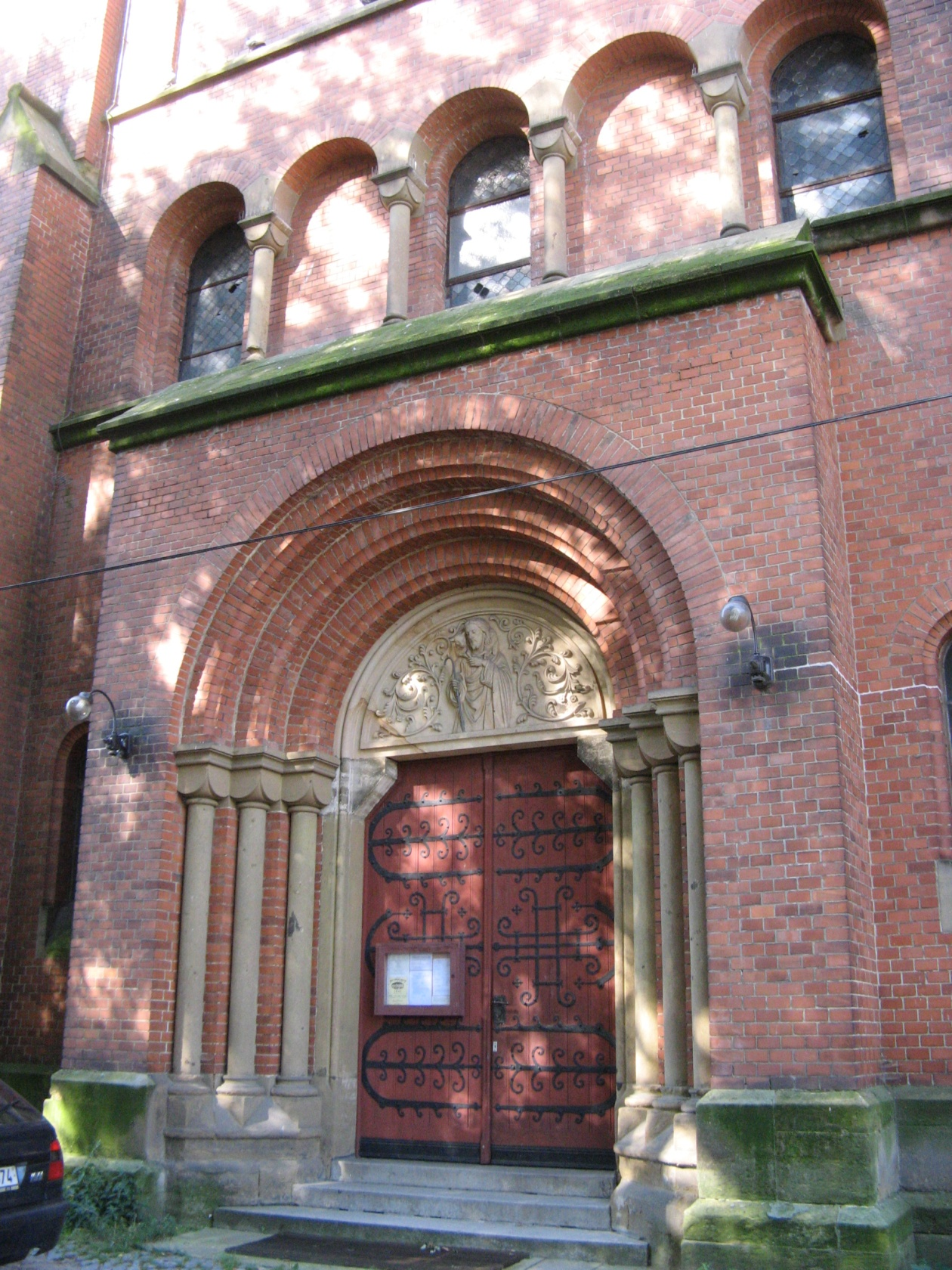 Kostel svatého Josefa (Svitavy), hlavní vchod, Czech Republic